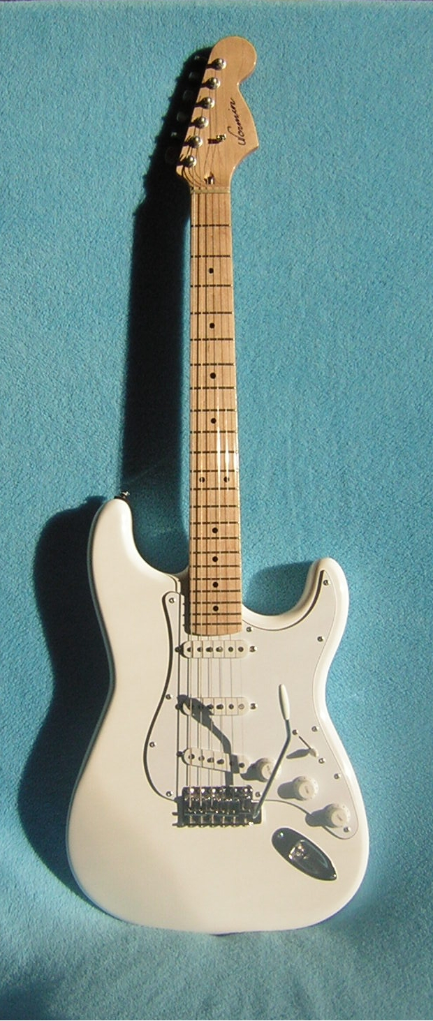 Stratocaster vom Hersteller Nermin. Nermin©Guitars ist ein Hersteller aus Österreich. Zur Produktpalette zählen hochwertige handgefertigte E-Gitarren mit höchster Soundqualität.